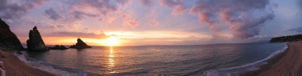 Lido di Palmi